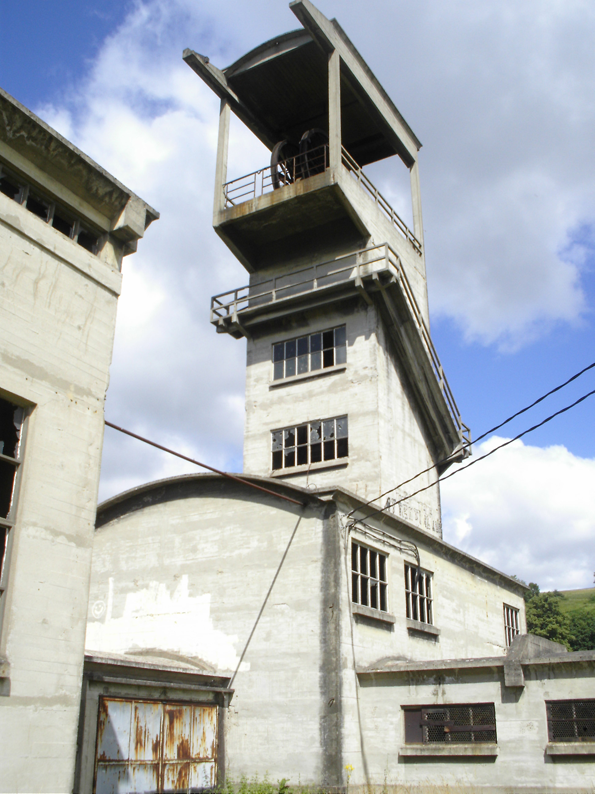 Puits des Combes, La Ricamarie, France 42